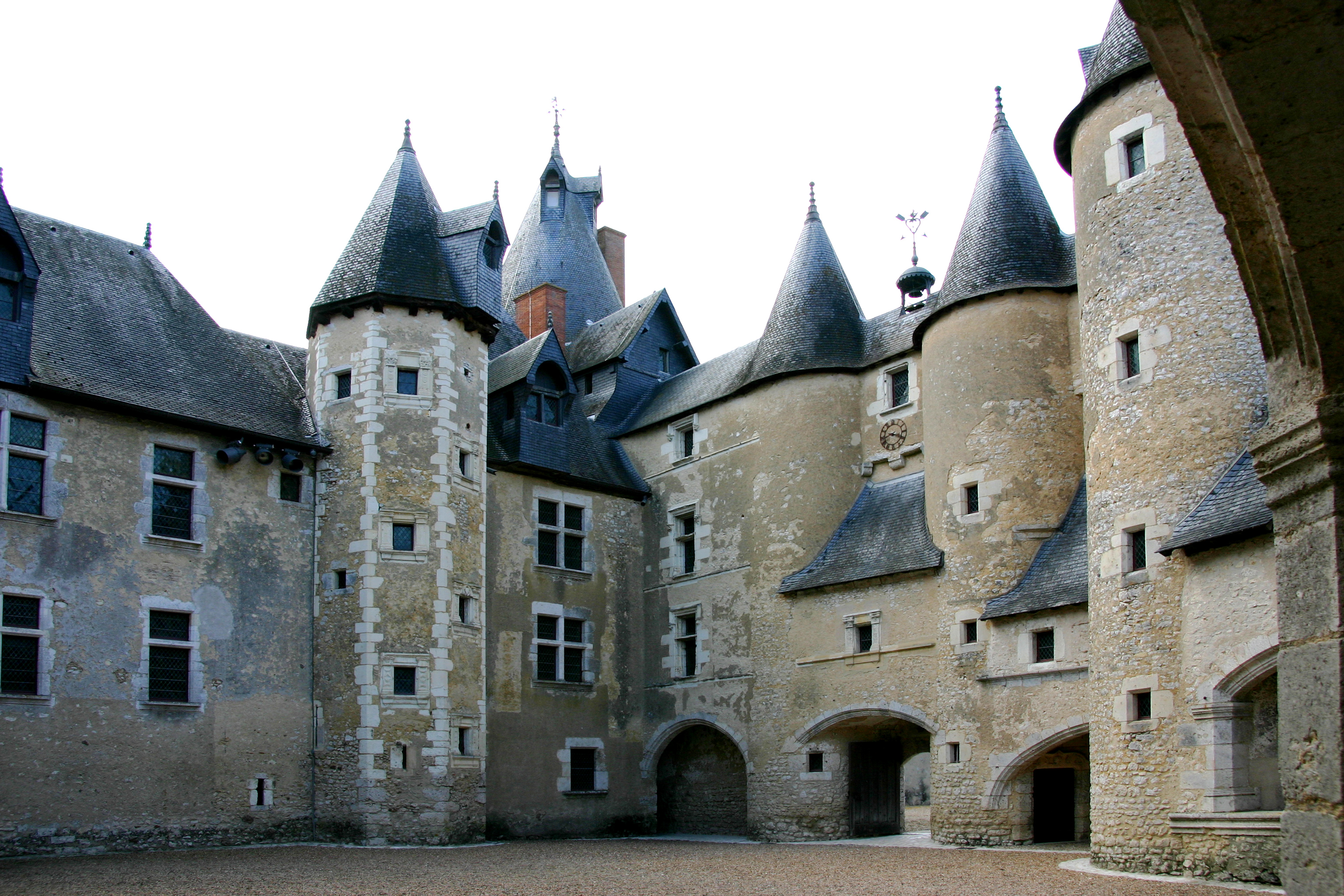 Schloss Fougères-sur-Bièvre